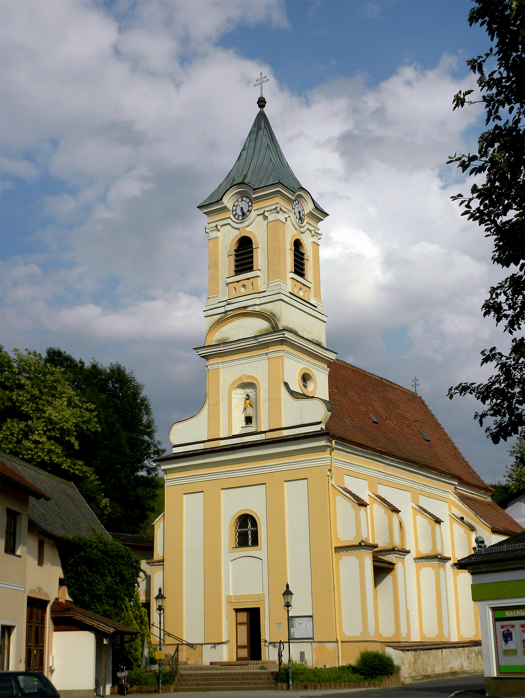 Kath. Pfarrkirche hl. Jungfrau und Gottesmutter